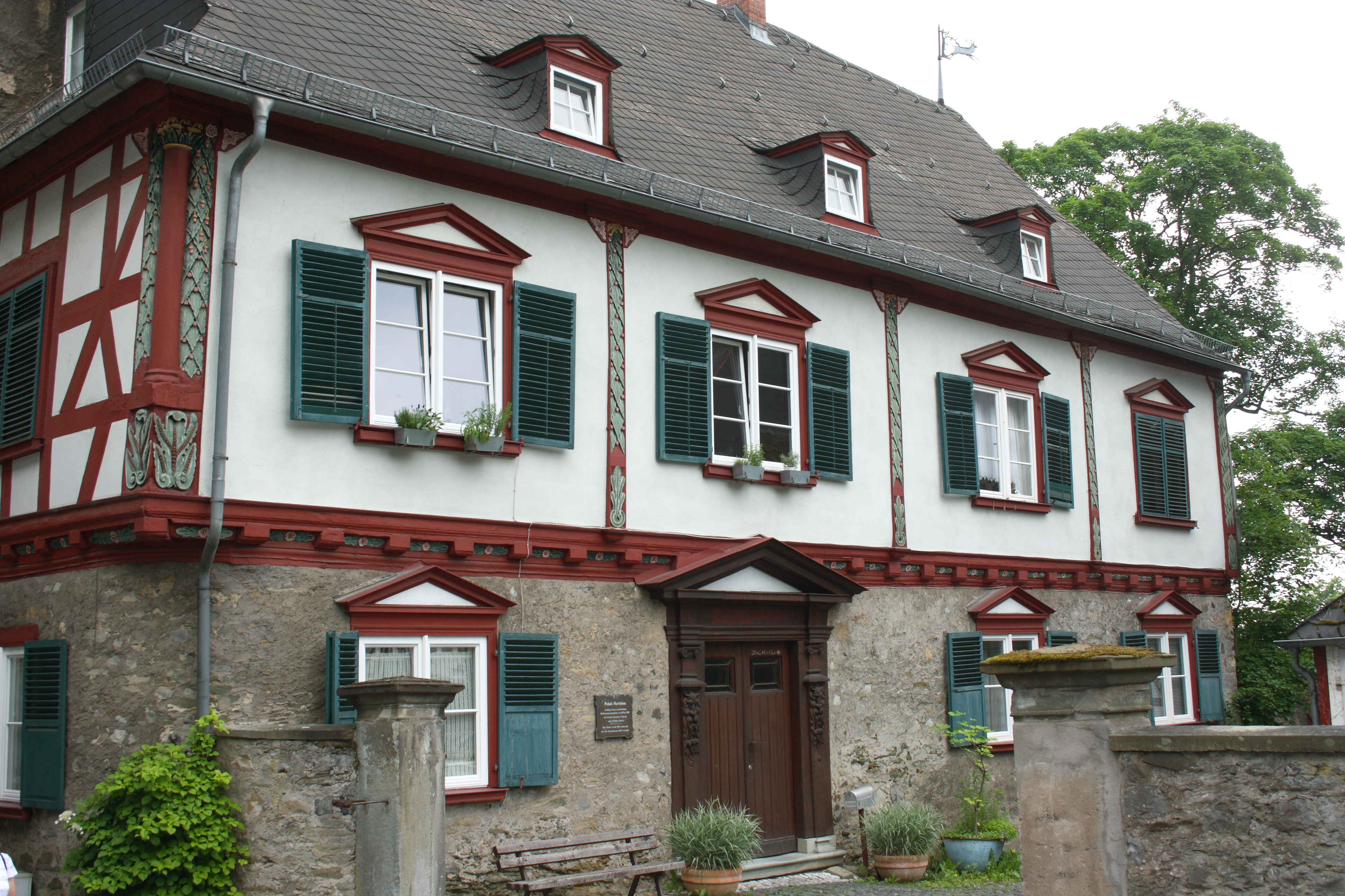 Palais Hartleben, Schloßstraße 9 in Braunfels im Lahn-Dill-Kreis (Hessen)